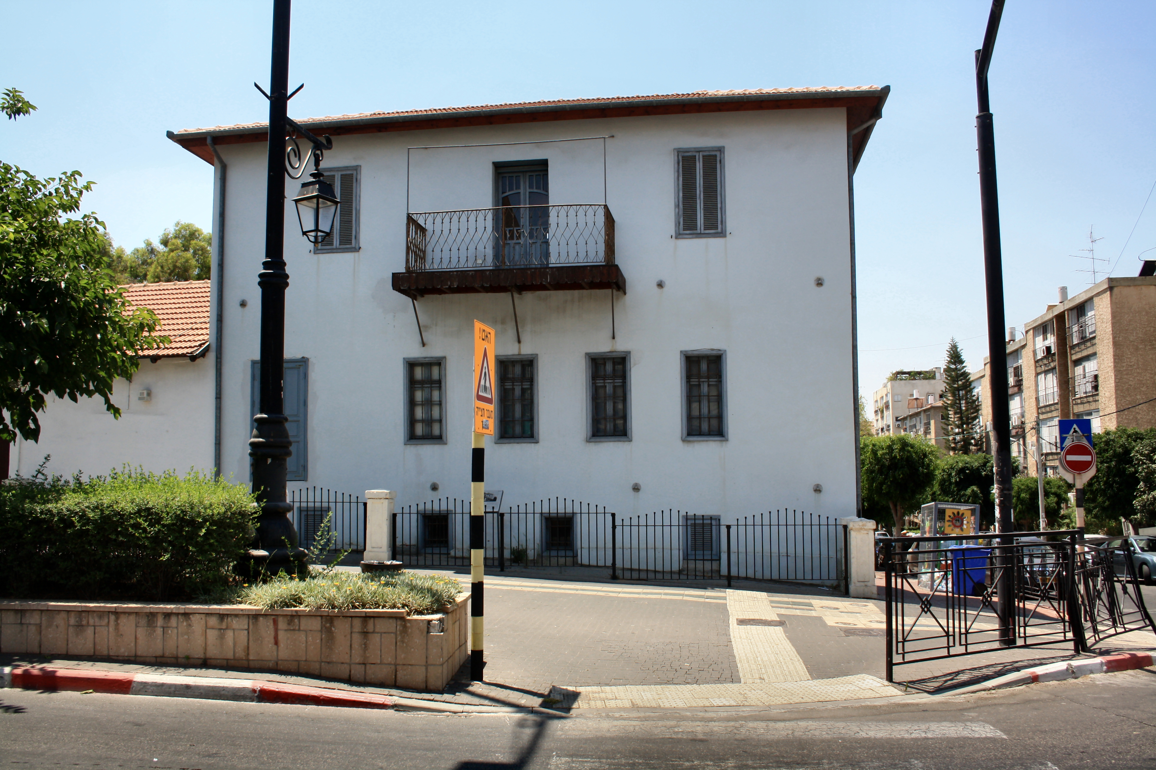 בית היסמן, כיכר המייסדים 5, ראשון לציון.